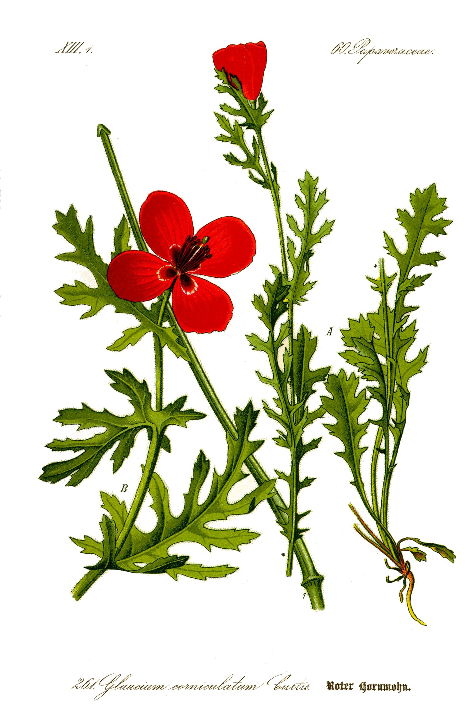 Name Glaucium corniculatum Family Papaveraceae